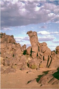 garden of gods namibie Eigen werk Jcwf 26 dec 2007 18:08 (CET)